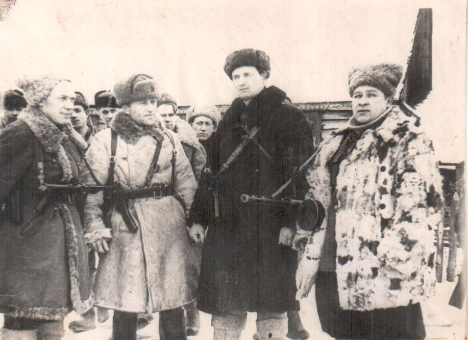 члены партизансклго военного совета